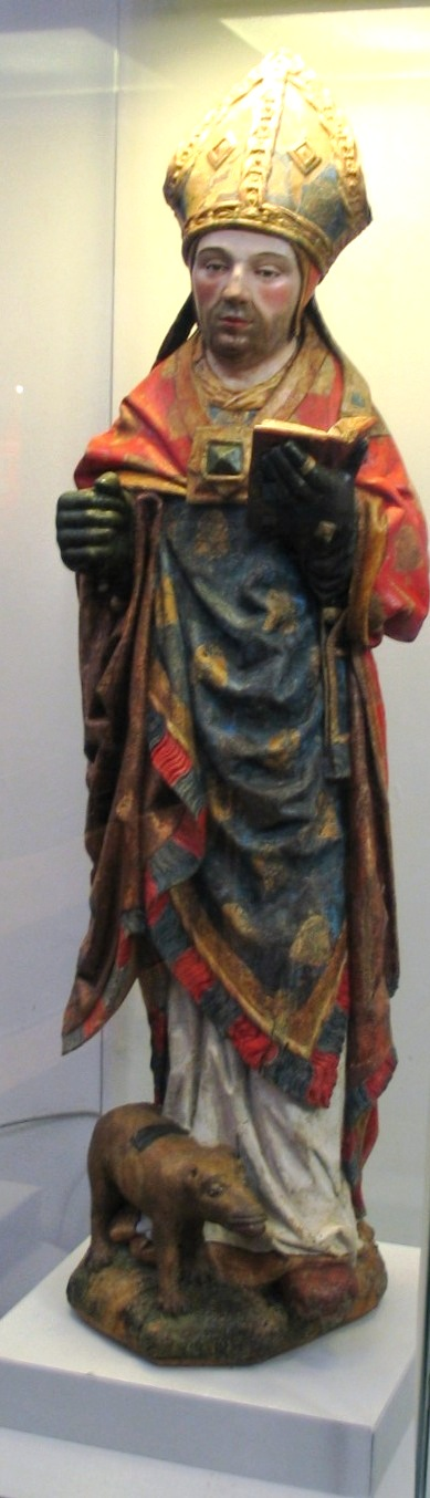 Remaclus in de Sint-Sebastiaanskerk van Stavelot - eigen foto